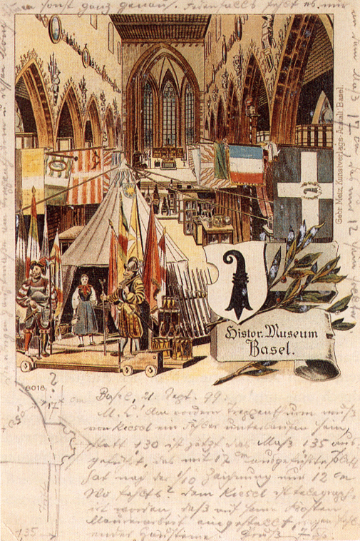 Postkarte mit der Innenansicht des Historischen Museums Basel in der Barfüsserkirche. Im Vordergrund zu sehen ist das Feldlager-Zelt der Basler Sternenzunft. Daneben stehen Figuren, die als Söldner des 16. Jh. bzw. 17. Jh. ausgestattet sind. Von den Emporen hängen historische Fahnen herab. Farblithographie von 1894. Der Text wurde 1899 geschrieben.